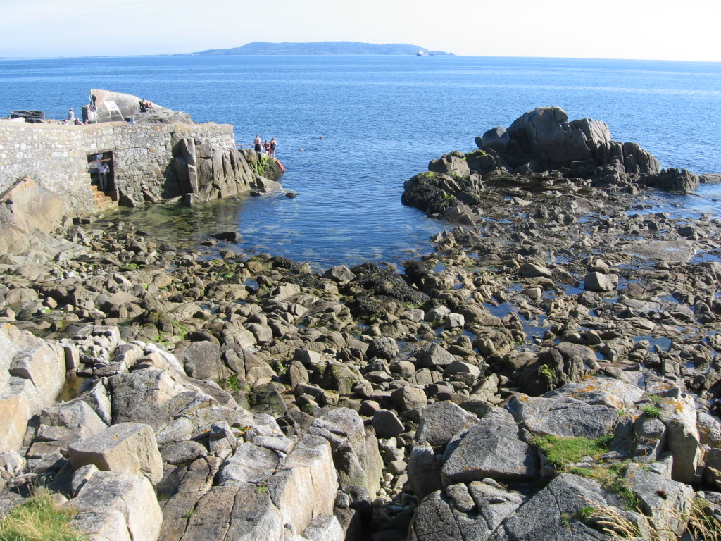 צילום ממגדל מרטלו